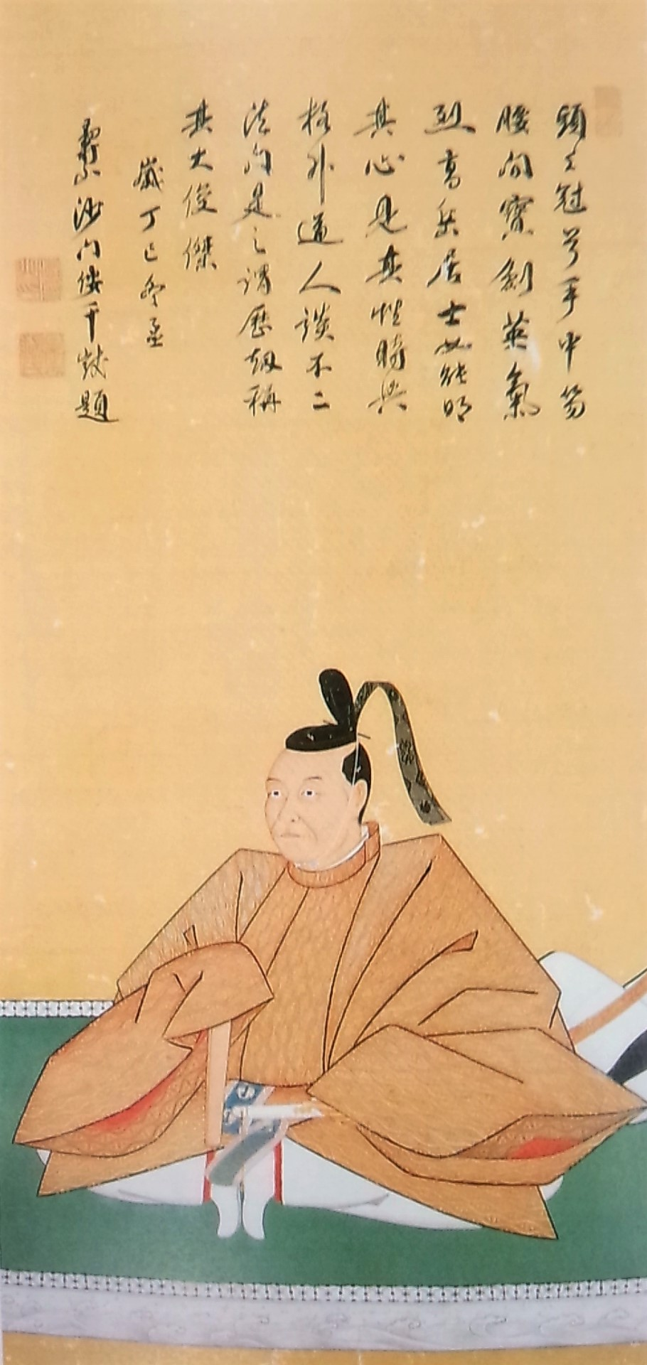 鍋島直朝の肖像。